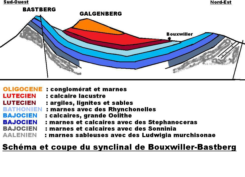 Schéma du synclinal de Bouxwiller (d'après la carte géologique au 1/50000 de Bouxwiller et le site internet de la Lithothèque d'Alsace)